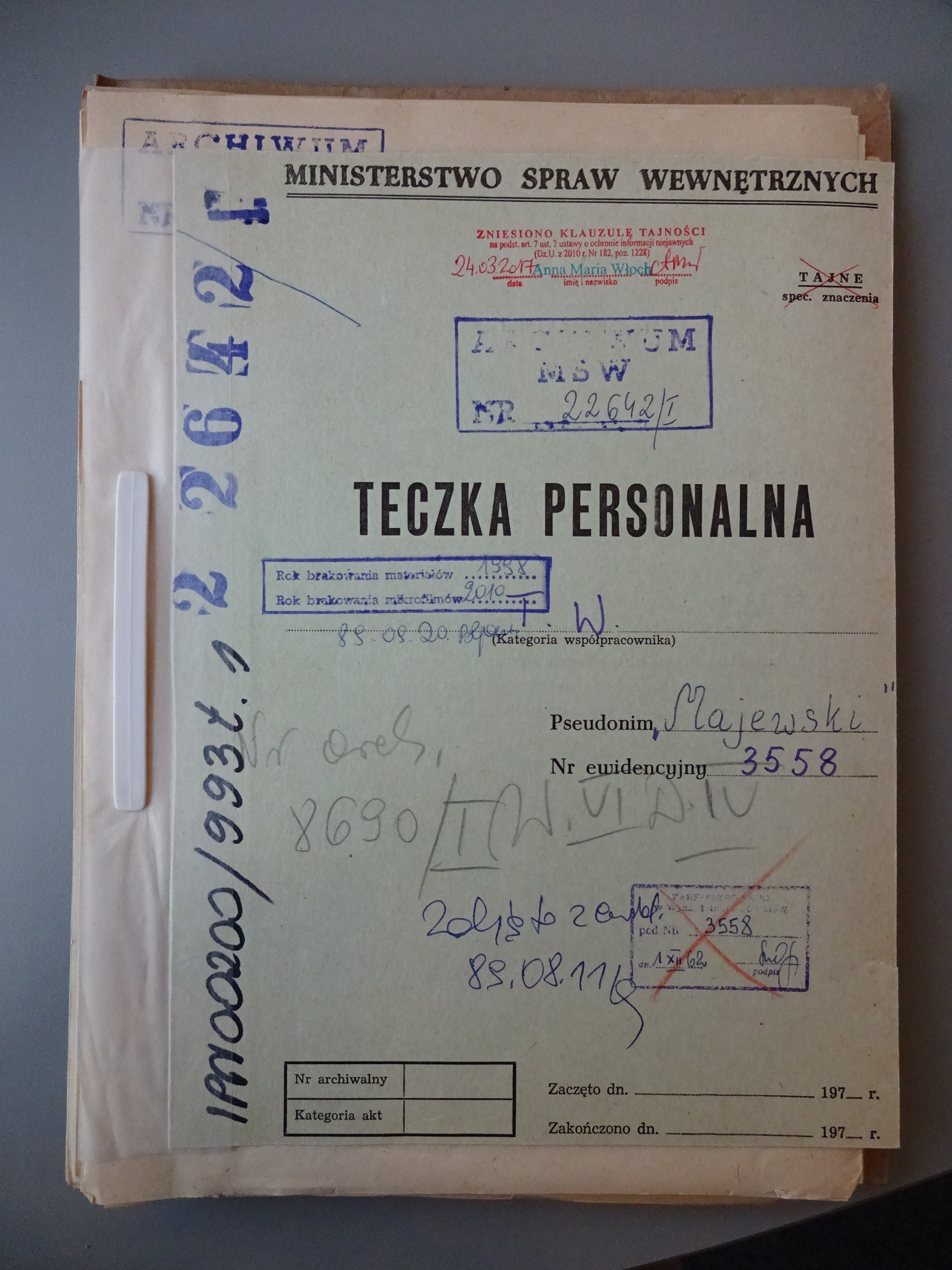 Stanisław Dąbrowski (1925–2016), teczka personalna